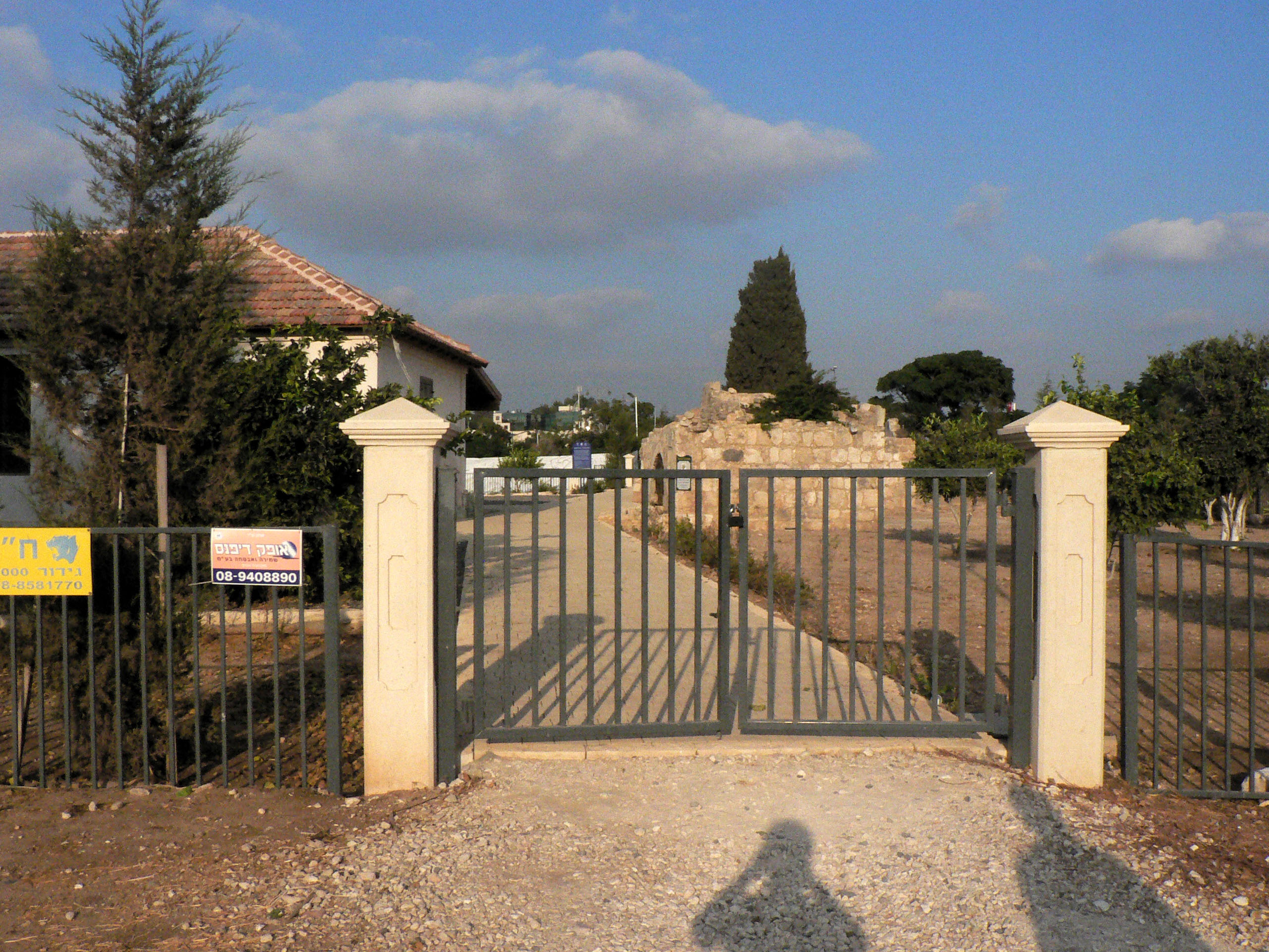 Ness Ziona נס ציונה Lerer Mansion בית לרר